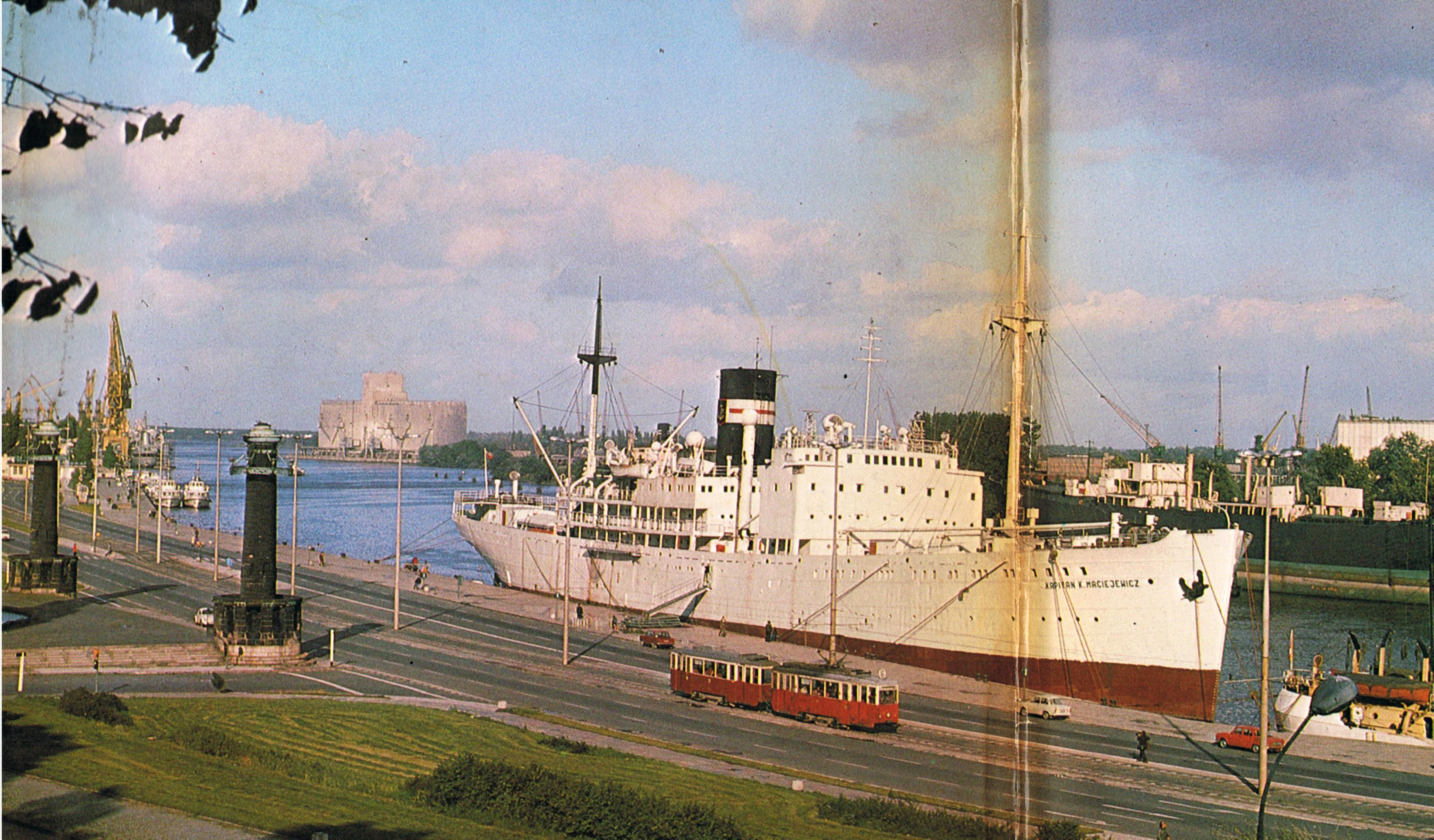 Statek SS Kapitan K. Maciejewicz przy Wałach Chrobrego w Szczecinie